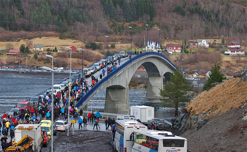 Eiksundbrua